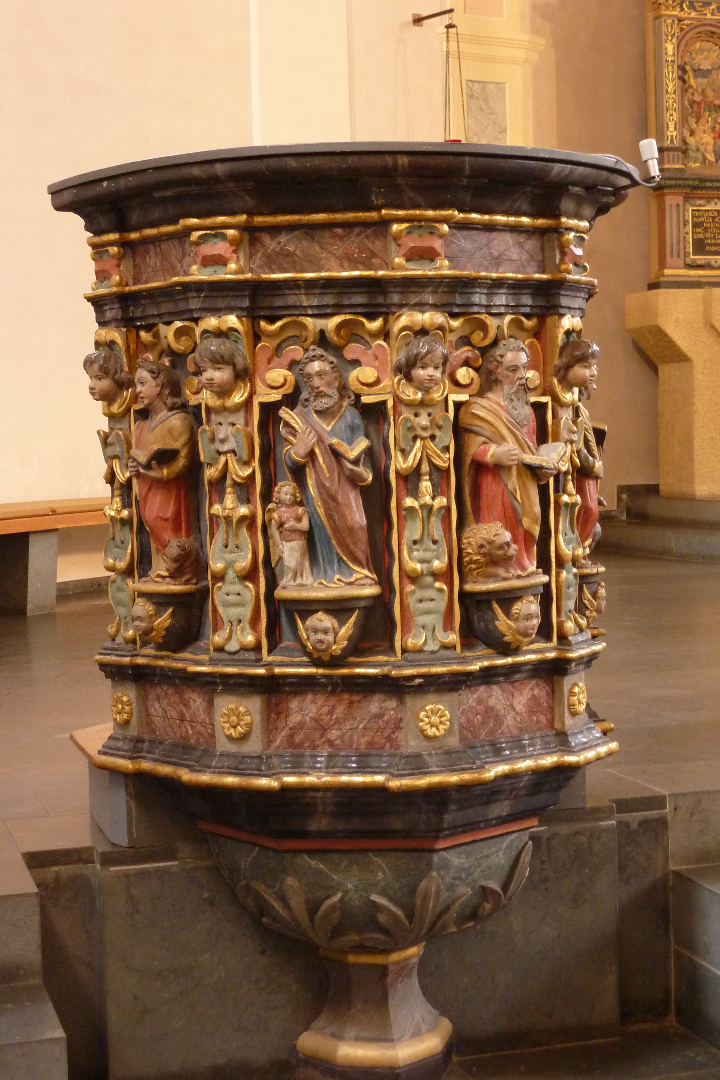 Kanzel (Ausschnitt) in der katholischen Pfarrkirche St. Martin in Hillesheim